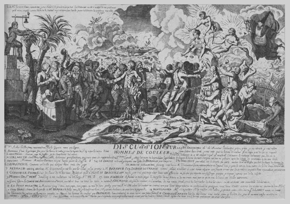 S.n.- Discussion sur les hommes de couleur, estampe, Paris, ca 1791. Notice n° : FRBNF40253888. Sujets présents sur l'image :Arthur Dillon, 1751-1810 ; Antoine Barnave, 1761-1793 ; Jean-Sifrein Maury, 1746-1817 ; Alexandre de Lameth, 1760-1829 ; Charles de Lameth, 1757-1832 ; Théodore de Lameth, 1756-1854 ; Louis de Curt, 1722-17..? ; Françoise-Augustine Duval d'Eprémesnil, 1754-1794 ; Jean François Reynaud de Villeverd, 1731-1812 ; Jean-Baptiste Gérard, 1737-1? ; Médéric Louis Élie Moreau de Saint-Méry, 1750-1819 ; Louis Charles Amédée comte de Faucigny-Lucinge, 1755-1801 ; Louis-Marthe de Gouy d'Arsy, 1753-1794 ; François-Dominique de Reynaud, comte de Montlosier, 1755-1838 ; Armand de Vignerot du Plessis de Richelieu, duc d'Aiguillon, 1761-1800 ; Edmond-Louis-Alexis Dubois de Crancé, 1747-1814 ; Jean-François César baron de Guilhermy, 1761-1829 ; Pierre-Victor Malouet, 1740-1814 ; Jean-Nicolas Démeunier, 1751-1814 ; Augustin de Robespierre, 1764-1794 ; Jérôme Pétion, 1756-1794 ; Henri Grégoire, 1750-1831 ; Antoine Balthazar Joseph d'André, 1759-1825 ; Rémi Armand Levasseur de Villebranche, 17..-1? ; Esclaves